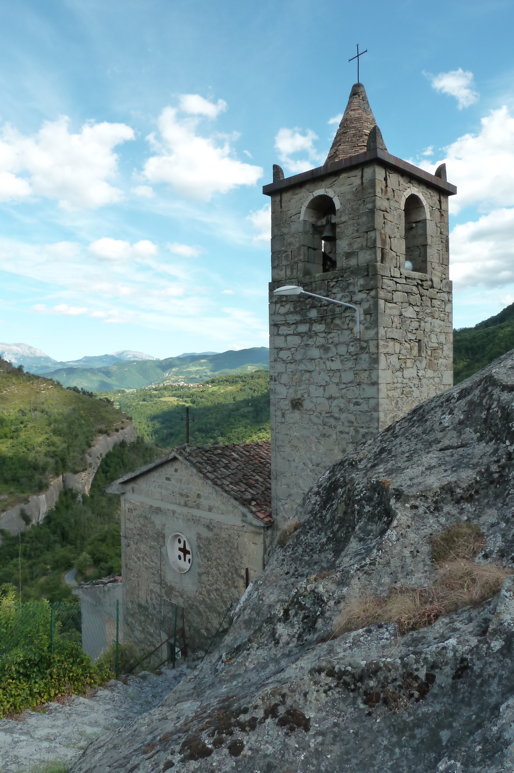 Santa Maria Annunziata-Sant'Antonio sita all'interno del paese, vicino ad un masso che sovrasta, fondata dai Canonici nel 1400